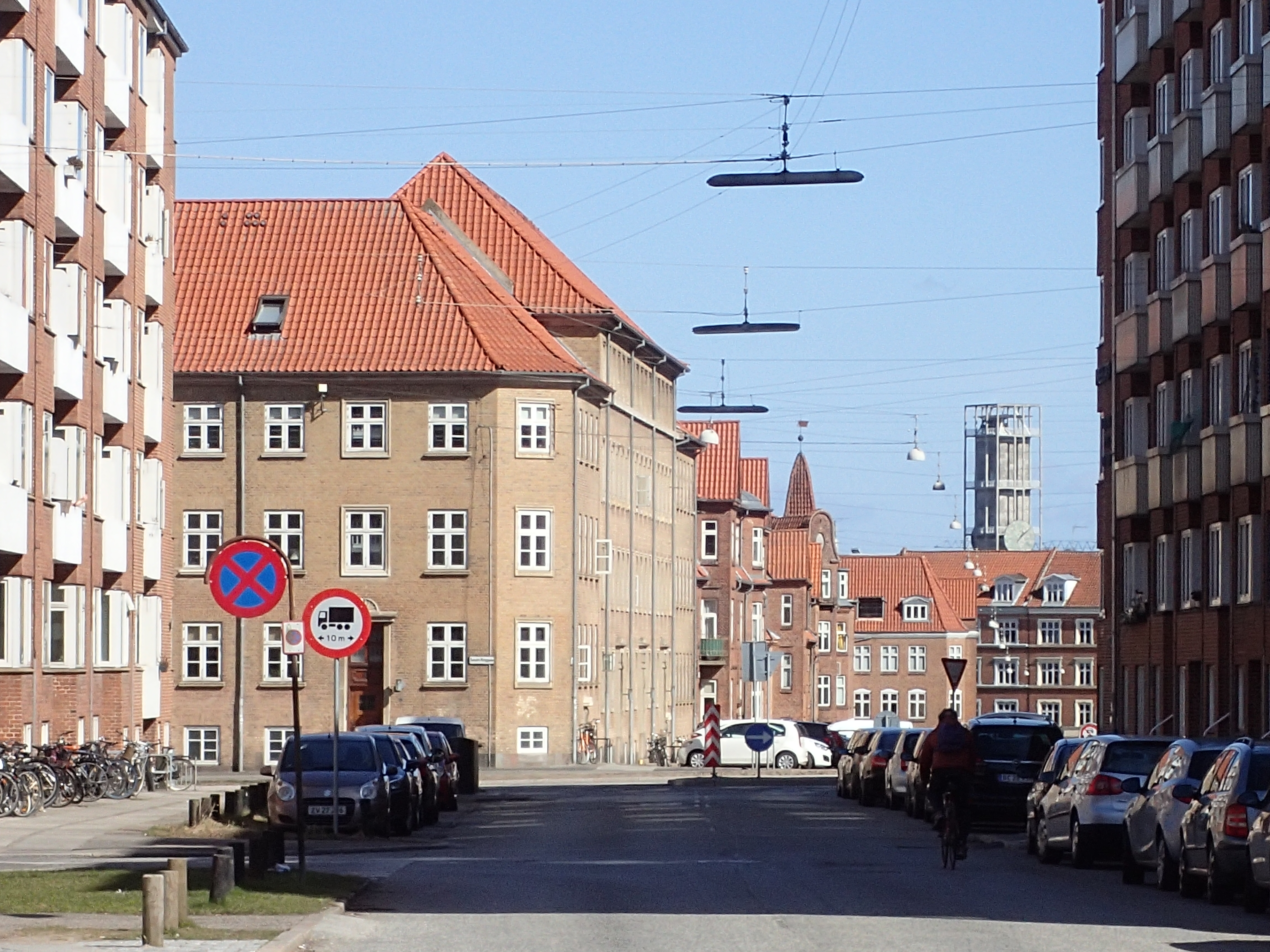 Kik ned langs Langenæs Allé mod Frederiksbjerg.